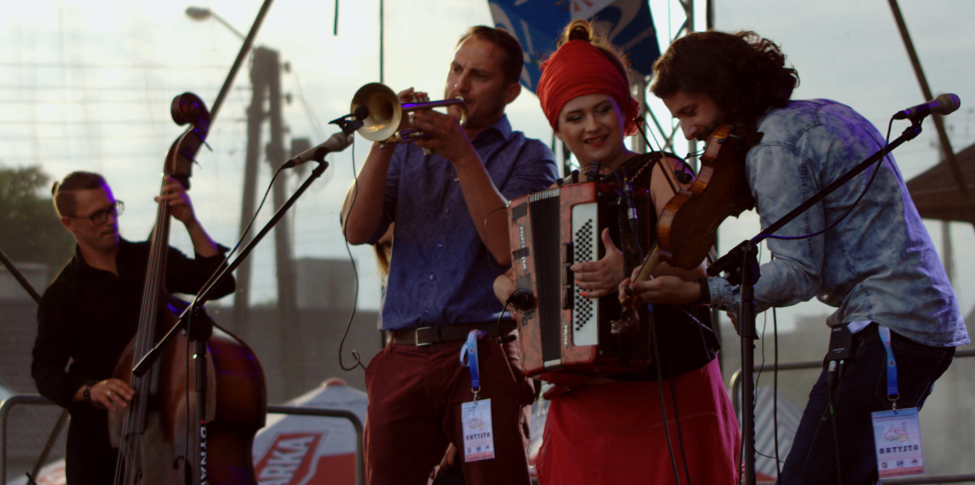 Dikanda podczas występu na Dniach Dobrodzienia